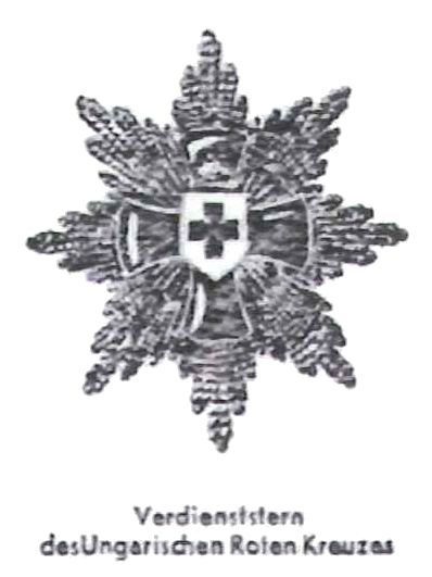 Darstellung der Verdienststern des Ungarischen Roten Kreuzes